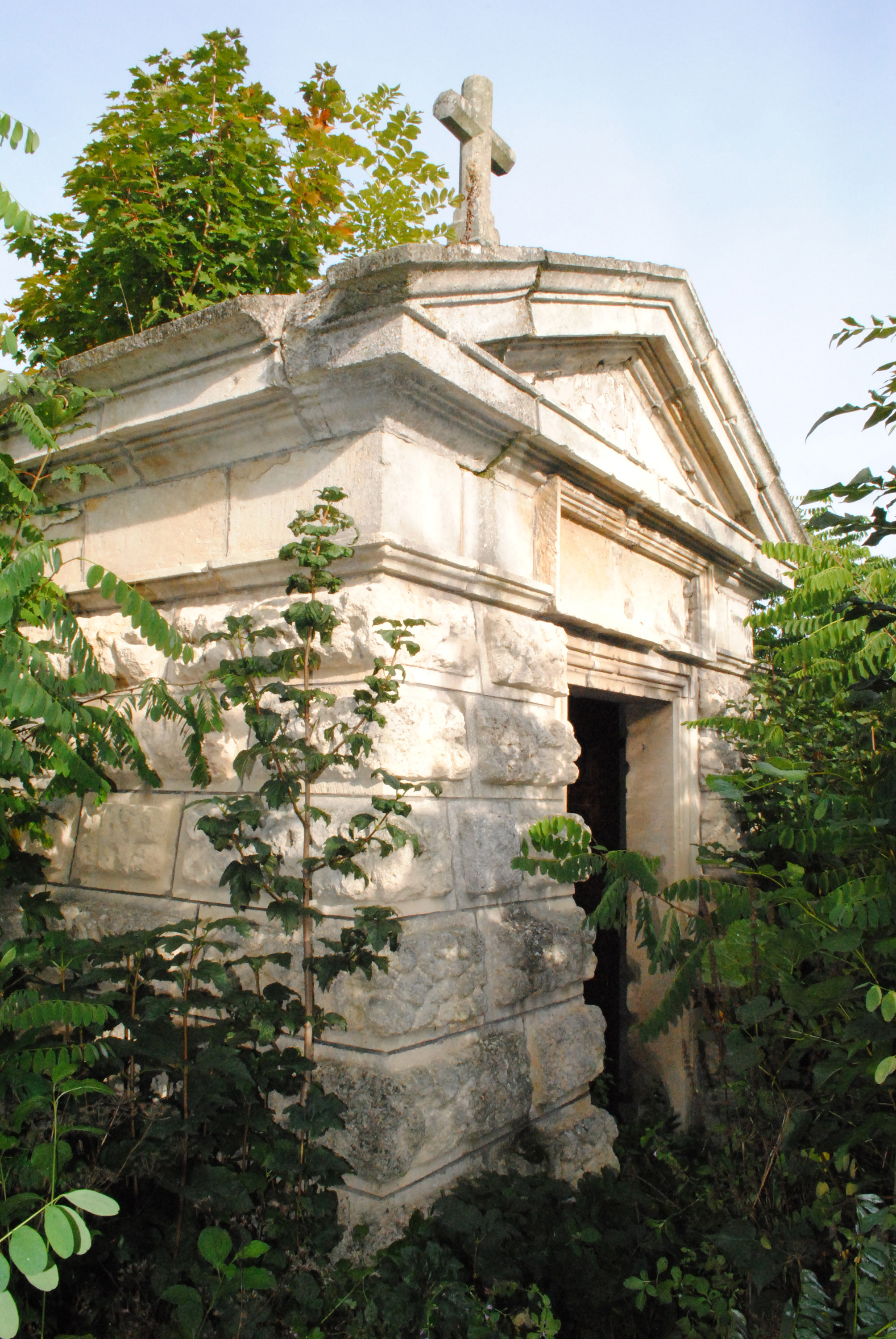 Гробівець баронів Гейделів на українсько-польському кладовищі (XIX ст.) в Берем’янах Бучацького району Тернопільської області. Вид на фасад передсіння з південно-східного боку.